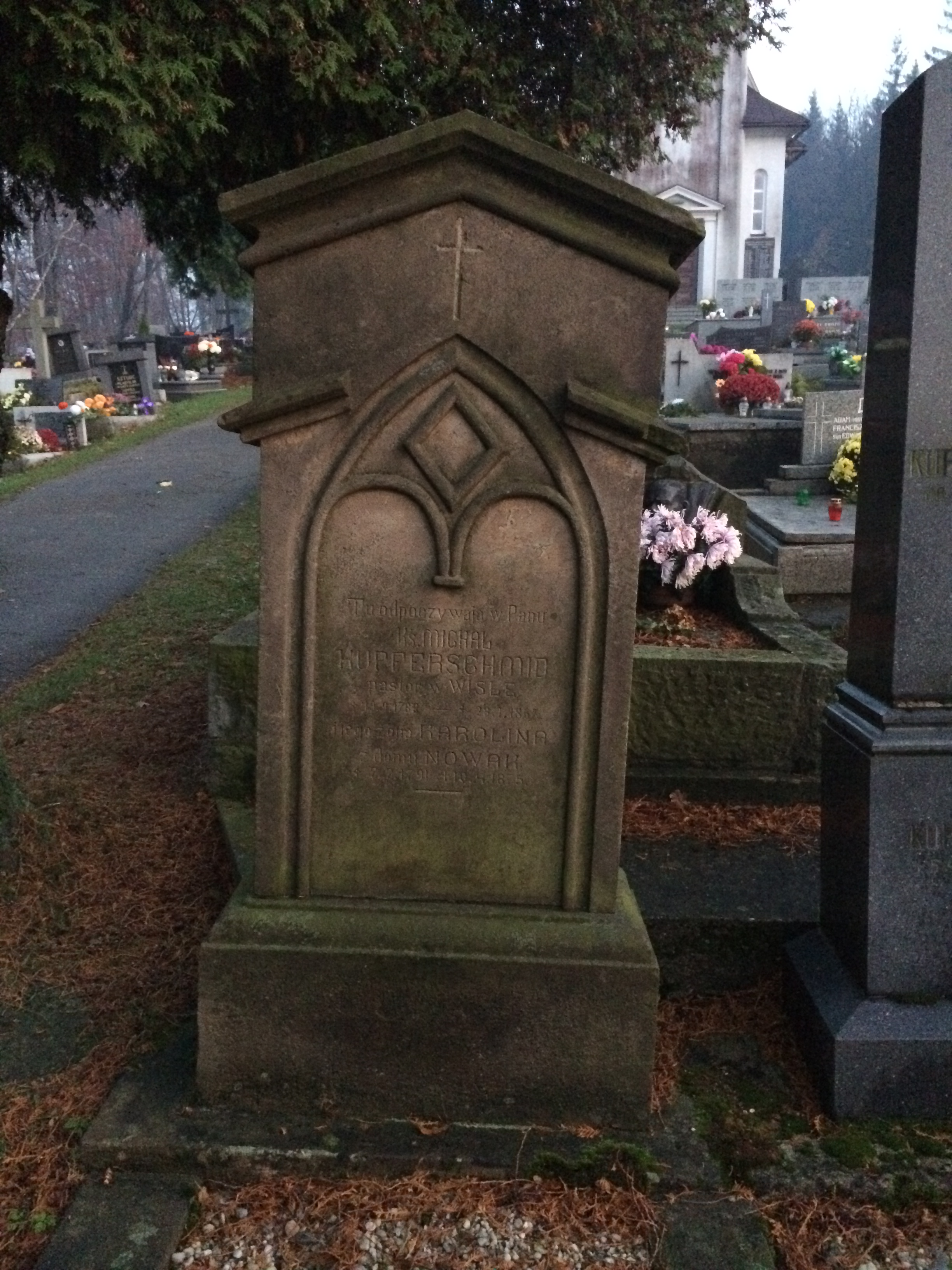 Grob pastora Michala Kupferschmida na cmentarzu ewangelickim w Wisle